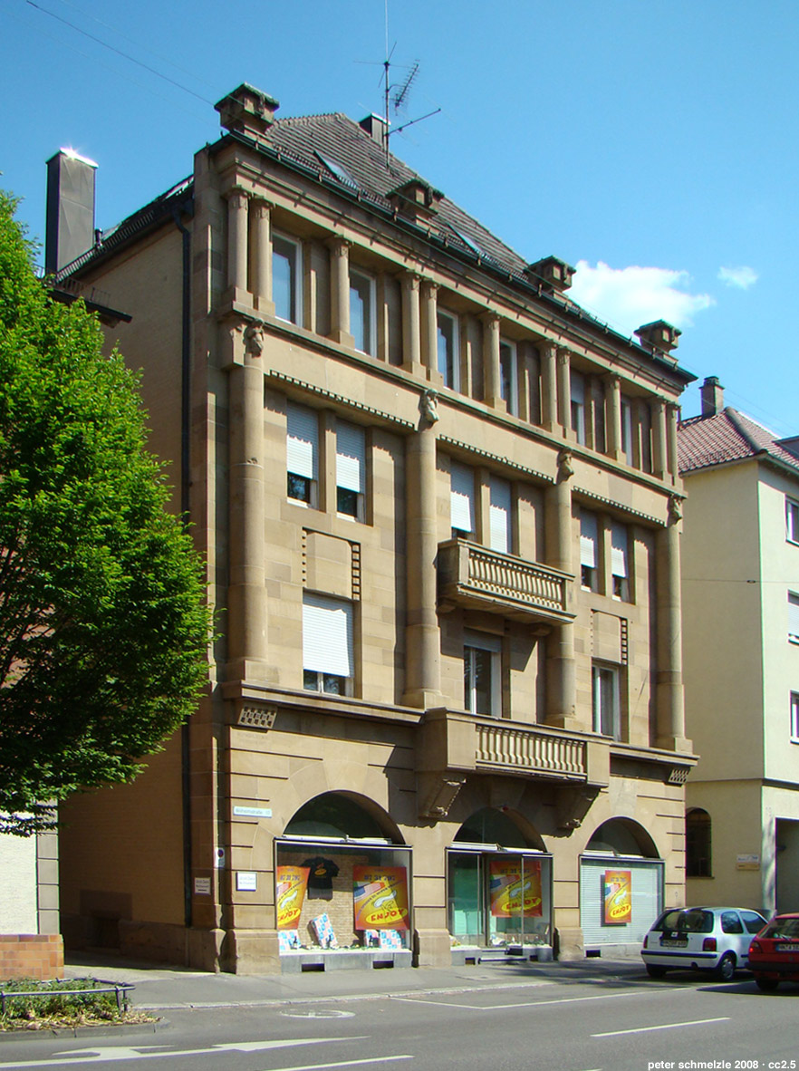 Wohn- und Geschäftshaus Friedrich Mössner in Heilbronn, Wilhelmstraße 17, erbaut 1907 von den Heilbronner Architekten Emil Beutinger und Adolf Steiner, unter Denkmalschutz